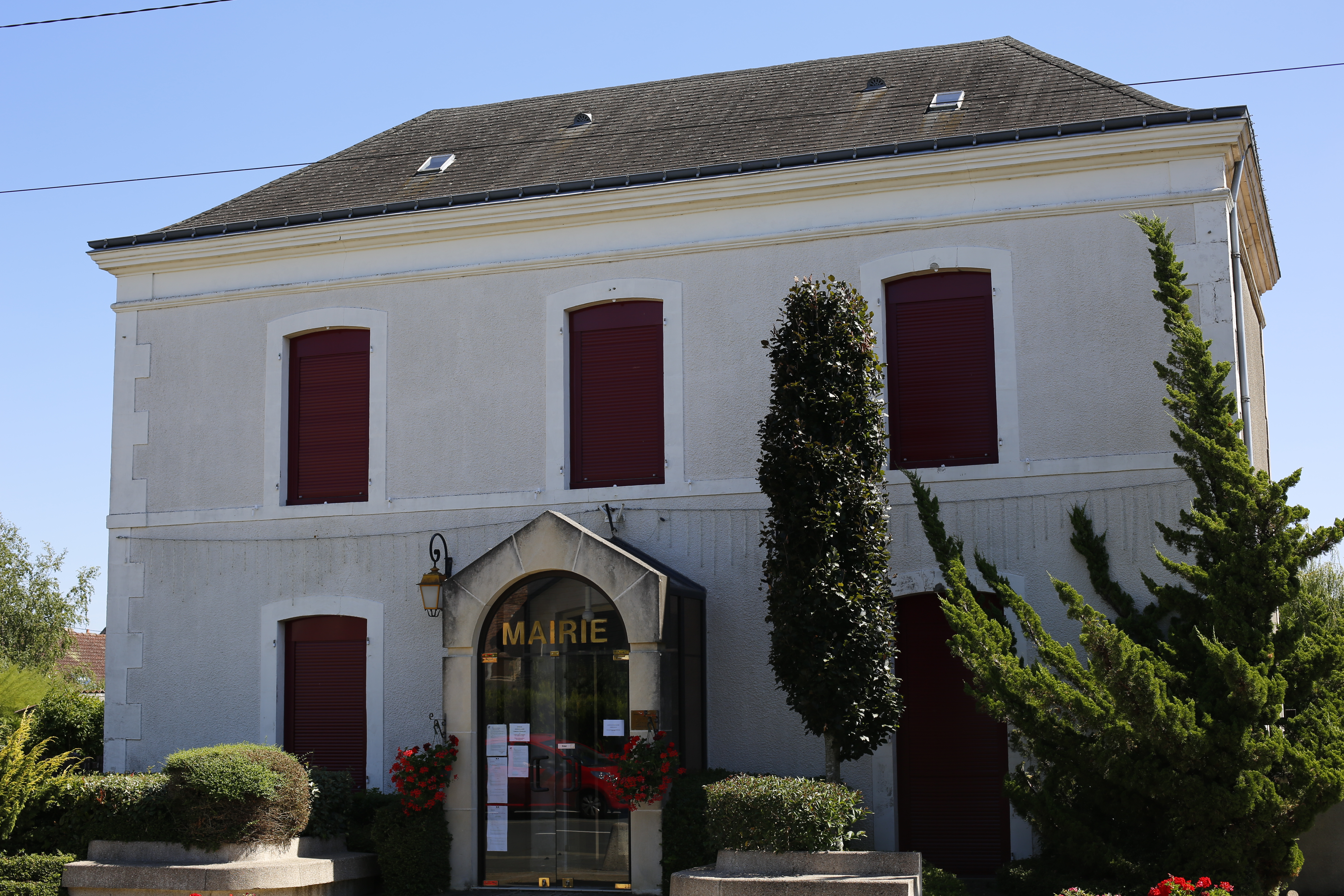 Mairie de Maresché.